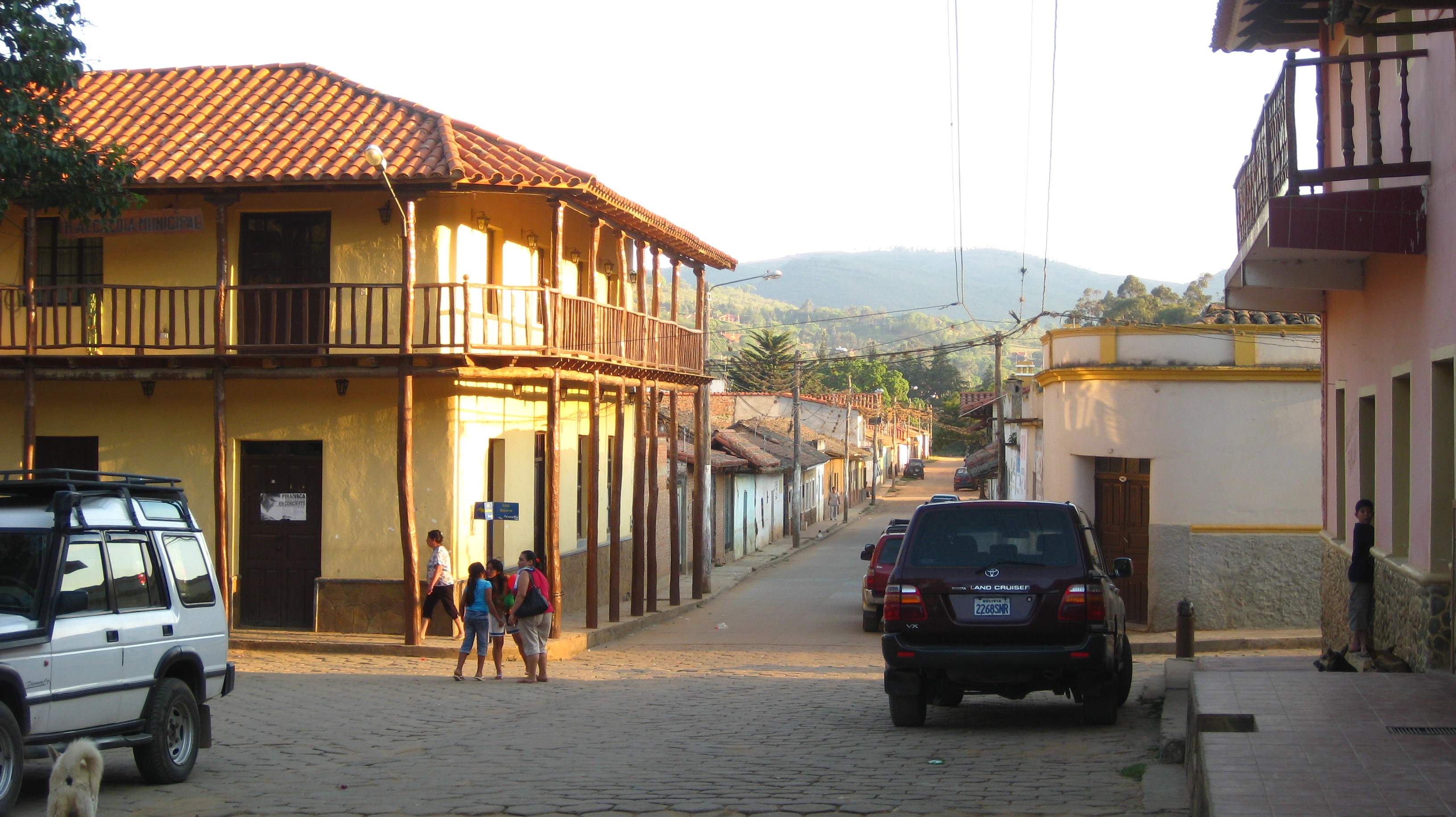 Calle de la localidad de Samaipata, Bolivia.